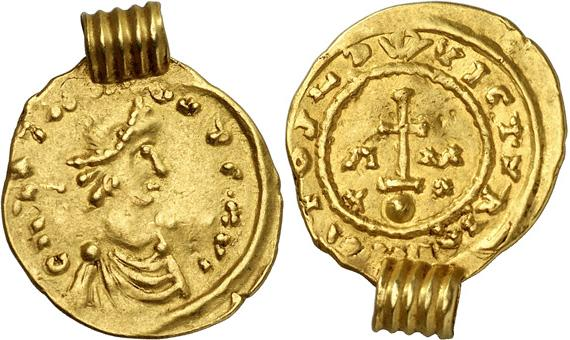 Solidus de 20 siliques au nom de Clotaire II (613-629). Avers : CN LOT ARIVS AVC buste diadémé et drapé à droite. Revers : VICTVRIA CLOTARI croix latine au pied potencé, posée sur un globe, accostée des lettres A et M et le globe accosté des chiffres X et X, dans un cercle perlé. Le trésor de Wieuwerd contenait au moins une dizaine de sous de Clotaire montés en pendentifs dont neuf conservés au Musée d’Utrecht. Voir Lafaurie et autres, 1961, p. 78-107. A. Pol nous a indiqué qu’un exemplaire de mêmes coins que celui que nous présentons est conservé au Musée de Liverpool, trouvé dans l’Est du Kent avant 1857.